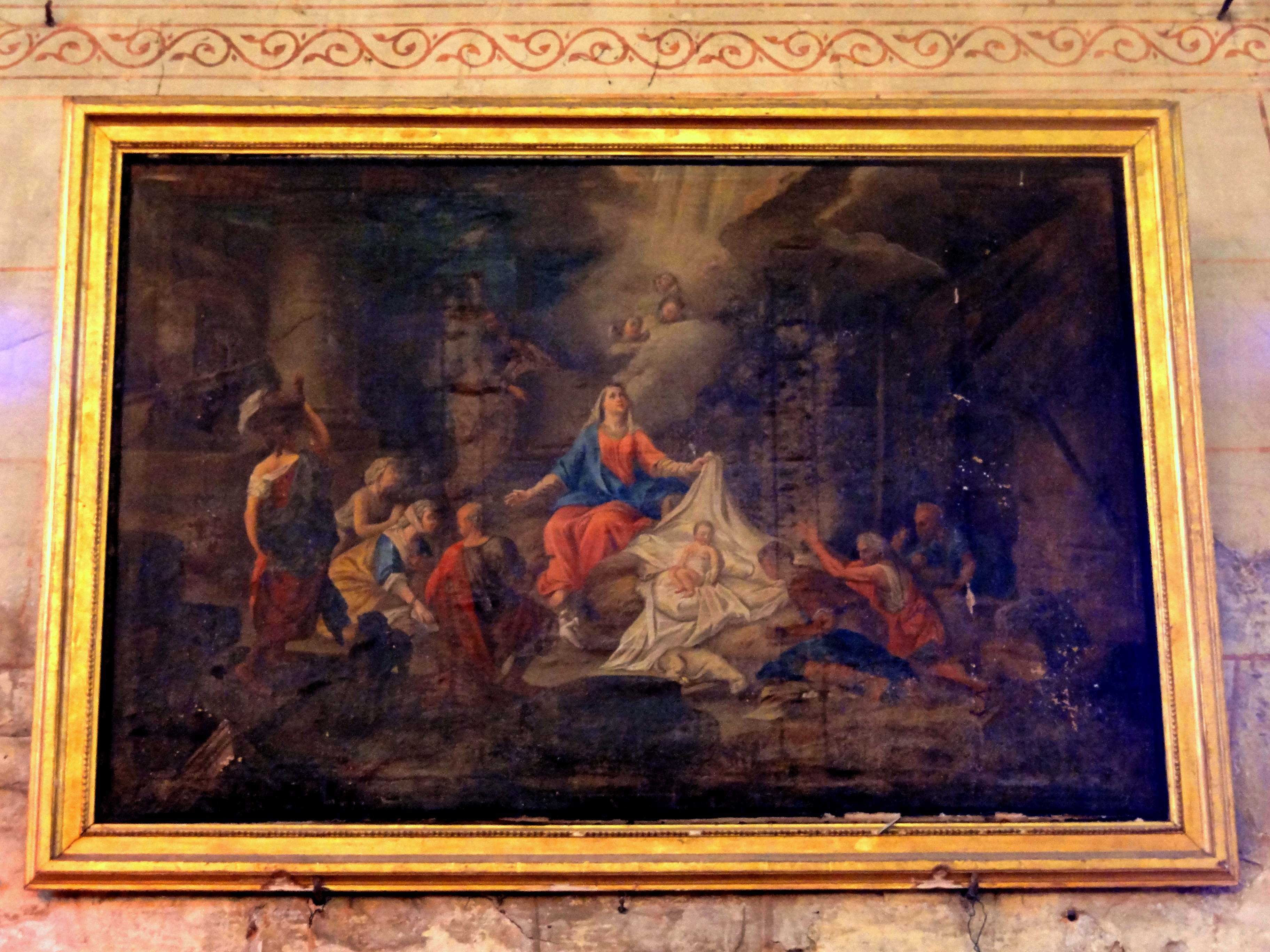 Mobilier de l'église (voir titre).